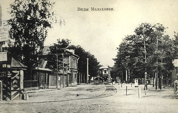 Петропавловская (ныне – Советская) улица в рабочем посёлке Малаховка, 1903 год